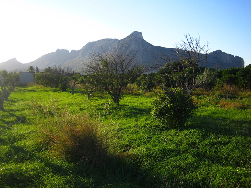 La Segària, muntanya de El Verger i Ondara, a la Marina Alta, País Valencià.